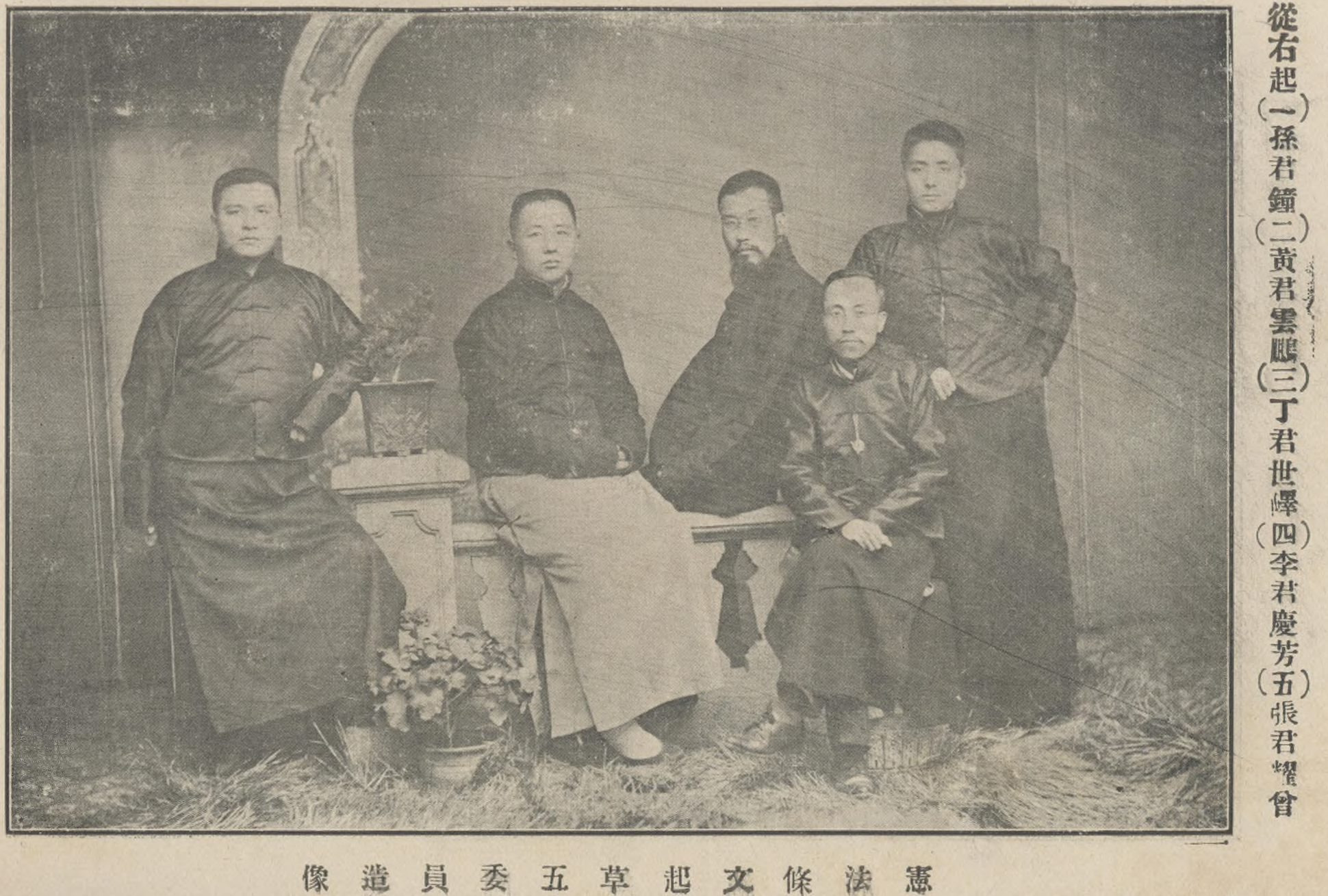 中文（台灣）: 《憲法新聞》 1913年1-24期附圖